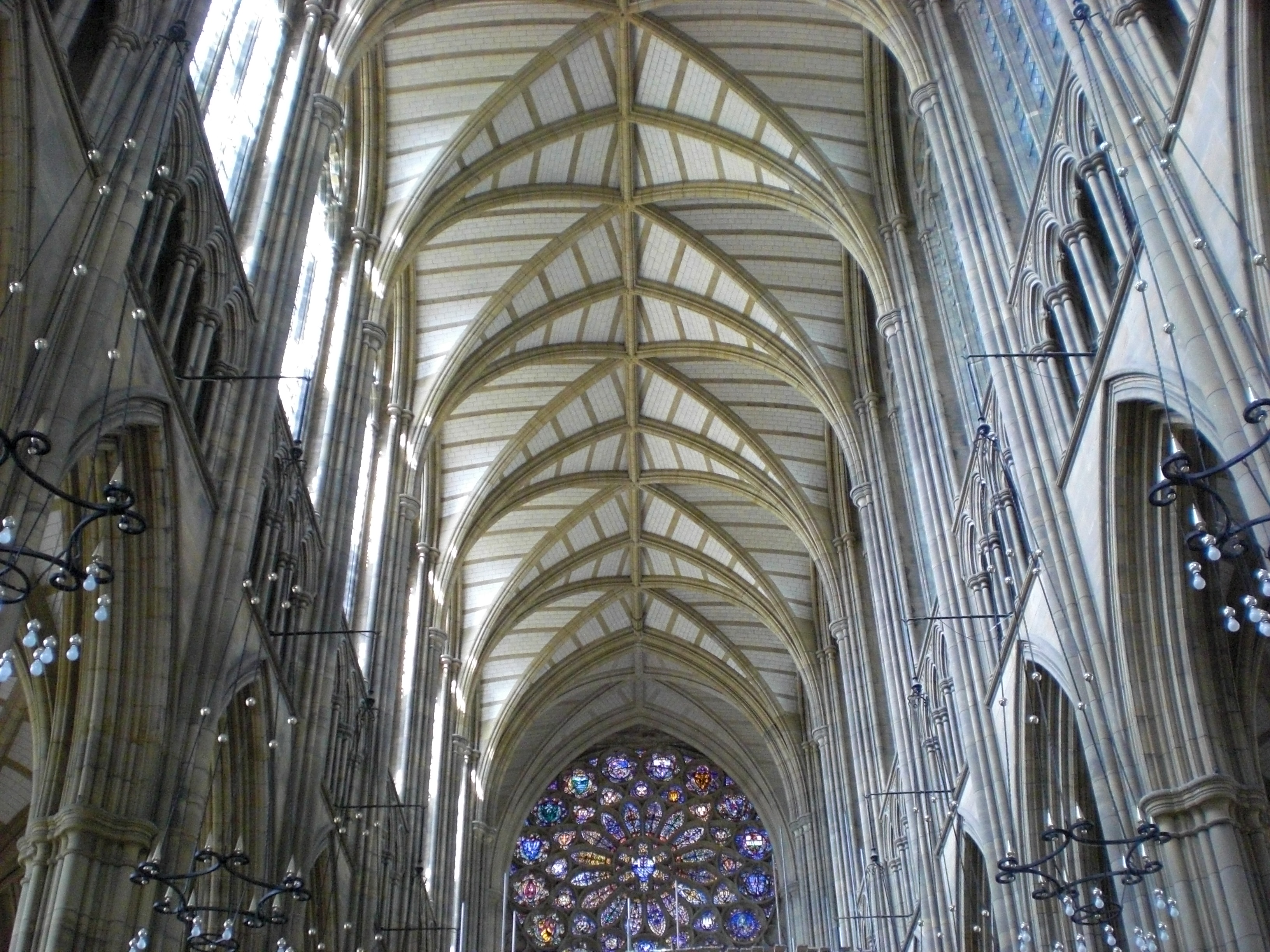 Innenraum der Kathedrale d. Lancing College mit dem großen Rosenfenster